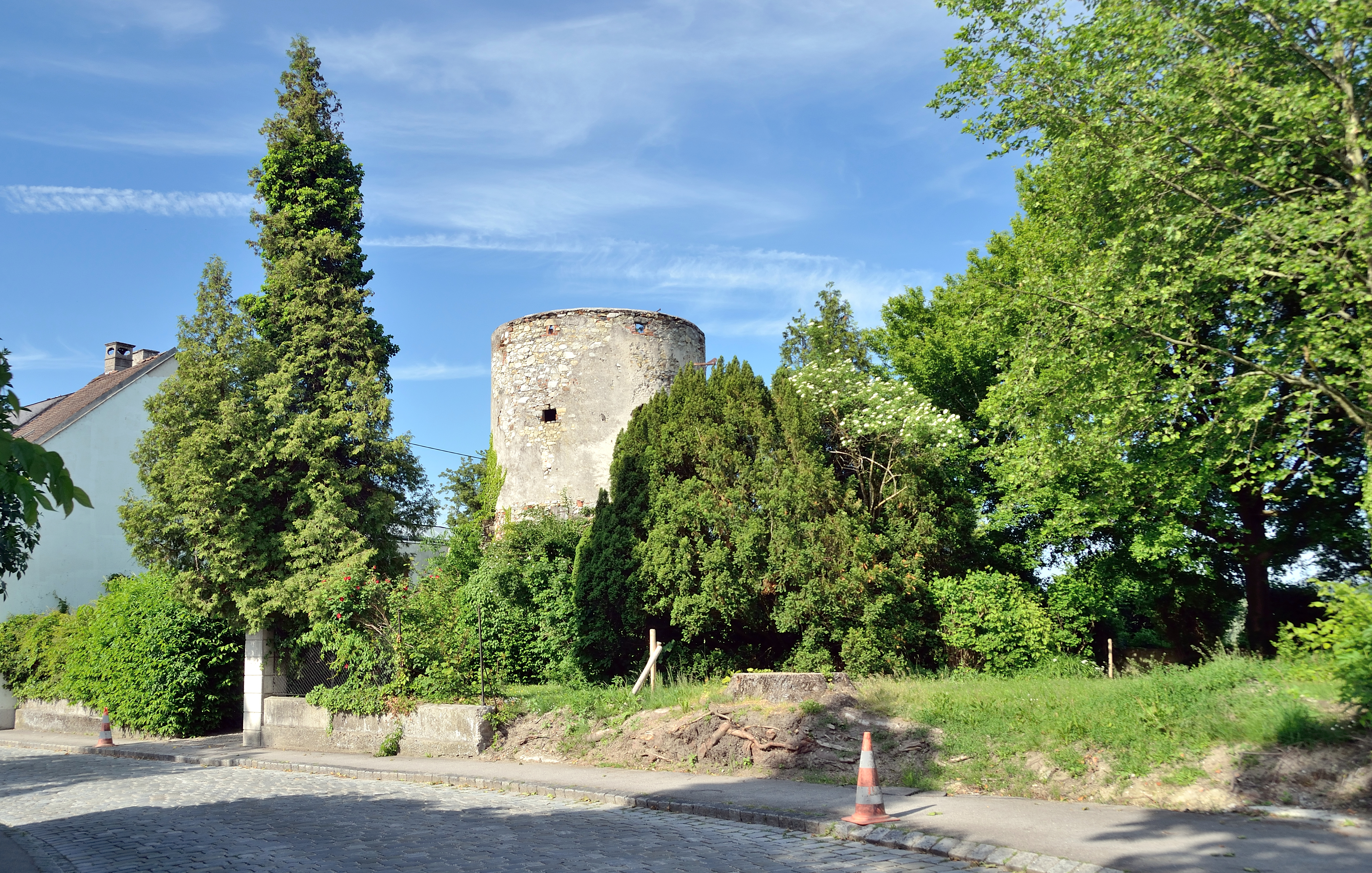 Der ehemalige Turmgarten in Ybbs an der Donau, inzwischen nach dem ehemaligen Besitzer in Professor-Wirtinger-Park umbenannt, wies mit 1978 4 Naturdenkmäler aus, 1 Faulbaum, 1 Birke und 2 Linden. Mit Mai 2018 ist nur noch der Stumpf einer der Linden erkennbar.